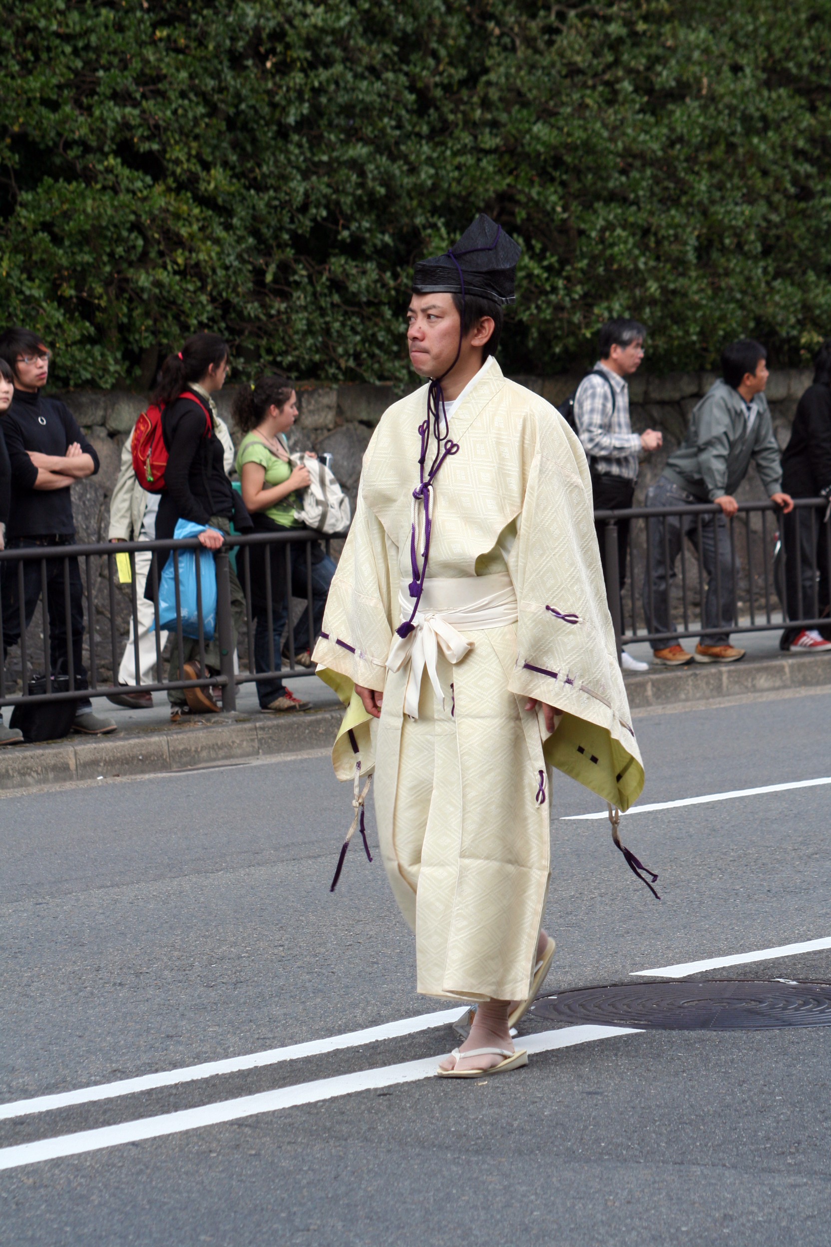 京都府京都市にて開催された時代祭。正午の御所から平安神宮までの行進の様子。2009年10月22日撮影。